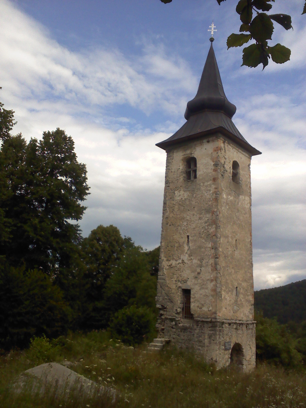 Zvonik podružnične cerkve sv. Petra in Pavla (župnija Črmošnjice) na Toplem Vrhu. Zvonik je edina stavba, ki je ostala v porušeni vasi. Streho so obnovili s sredstvi iz Južne Tirolske.